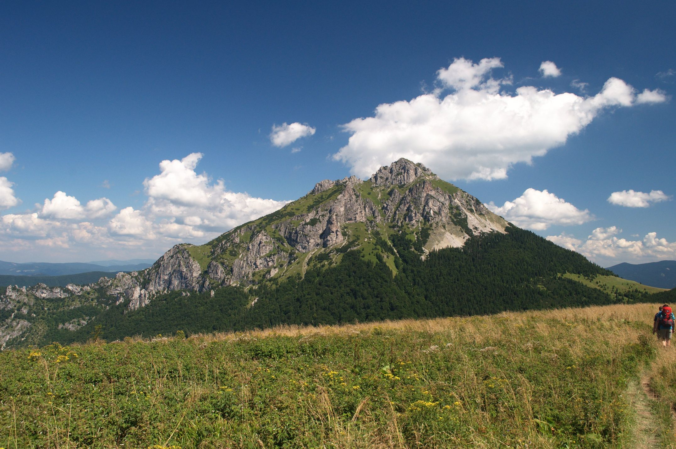 Meadow and Velky Roszutec